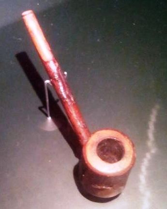 Pipa de Manuel Antonio